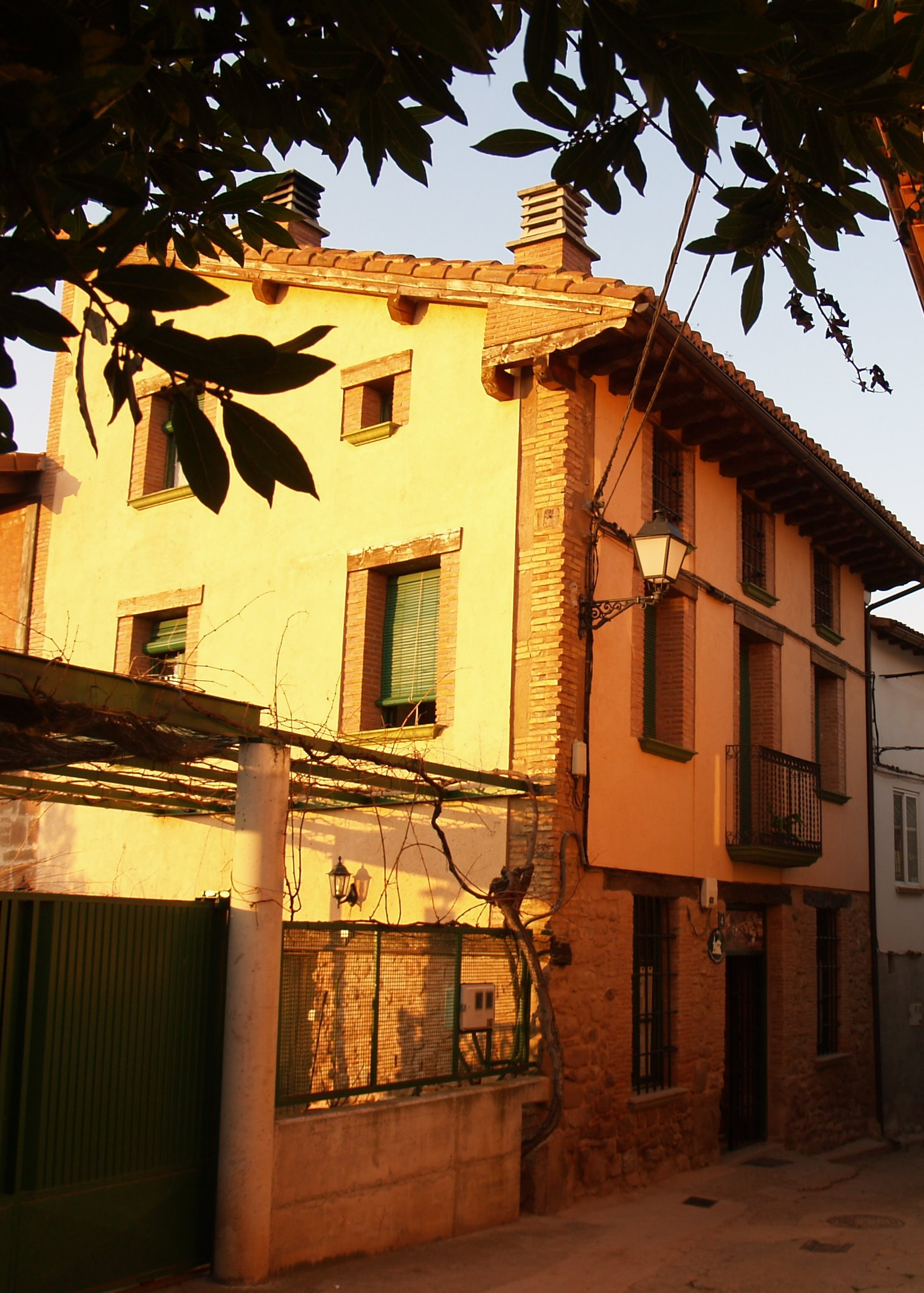 Casa Rural en un pueblecito de La Rioja. Cerca de Nájera y San Millán de la Cogolla